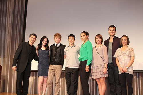 Команда Канады на командном чемпионате мира по фигурному катанию 2012. Слева направо: Скотт Моир, Тесса Вертью, Кевин Рейнольдс, Патрик Чан, Синтия Фанёф, Амели Лакост, Эрик Рэдфорд, Мэган Дюамель.